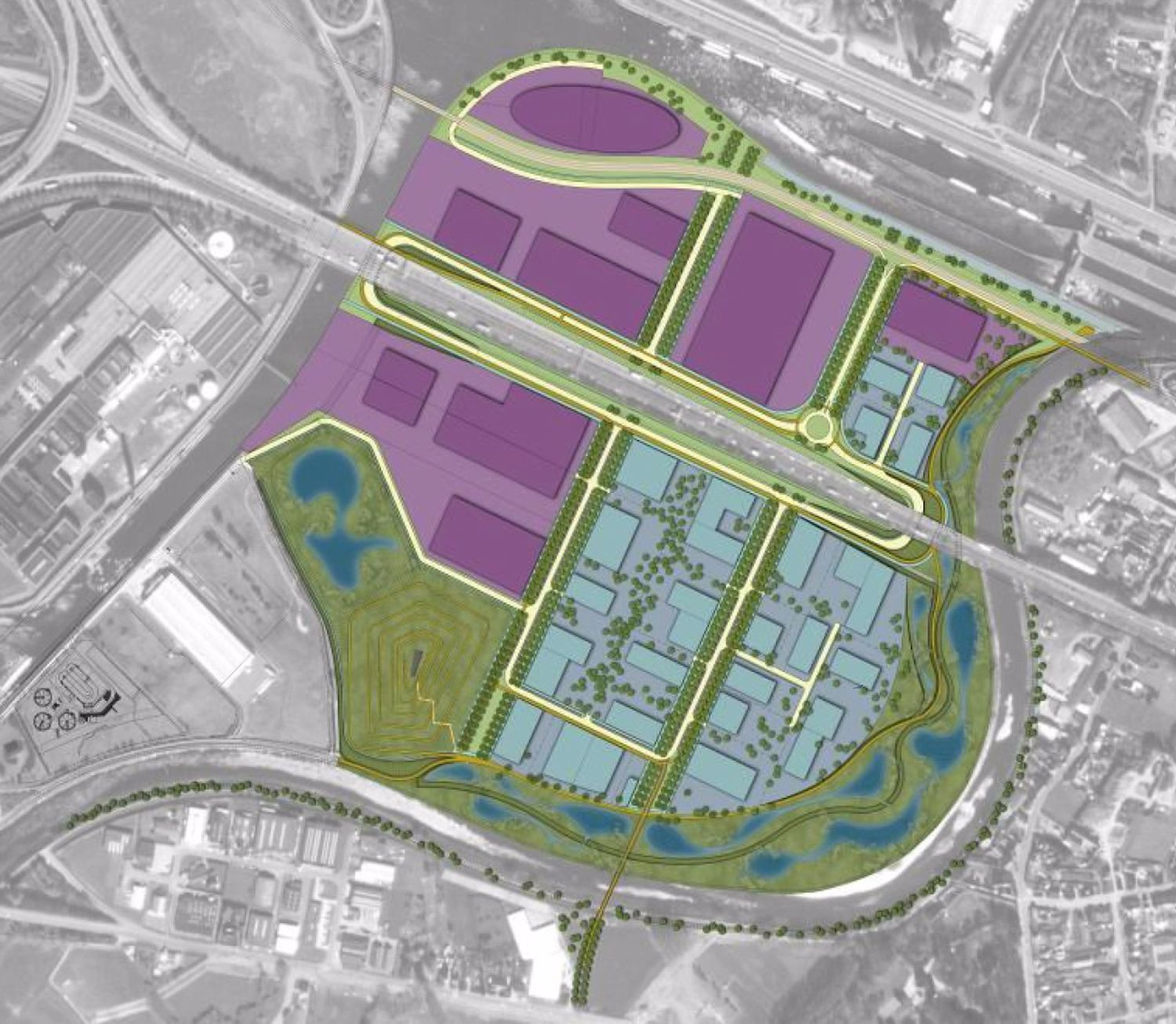 Goedgekeurd ontwerp van het Milieu Effecten Rapport betreft Eiland Zwijnaarde